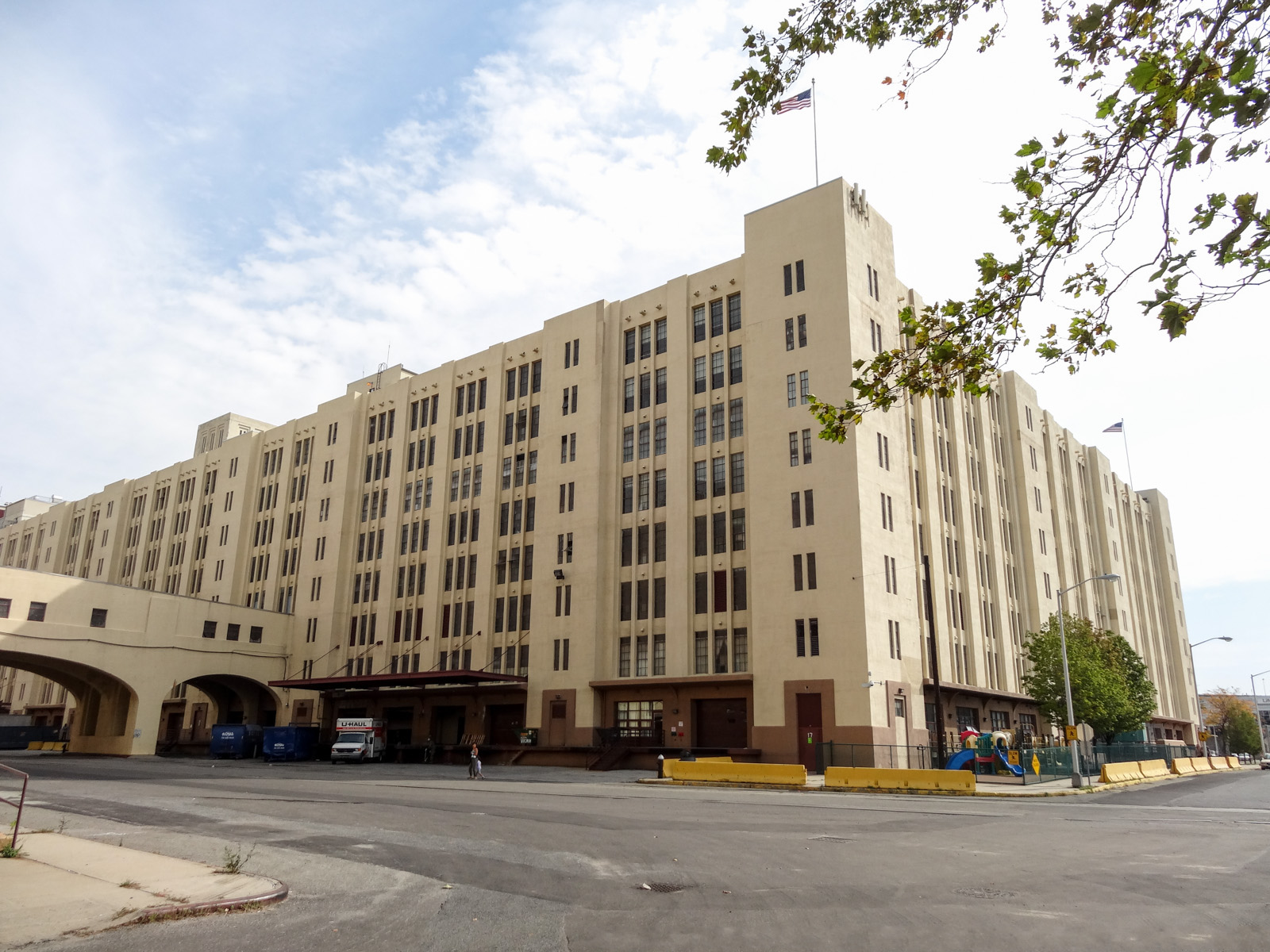 05895.jpg